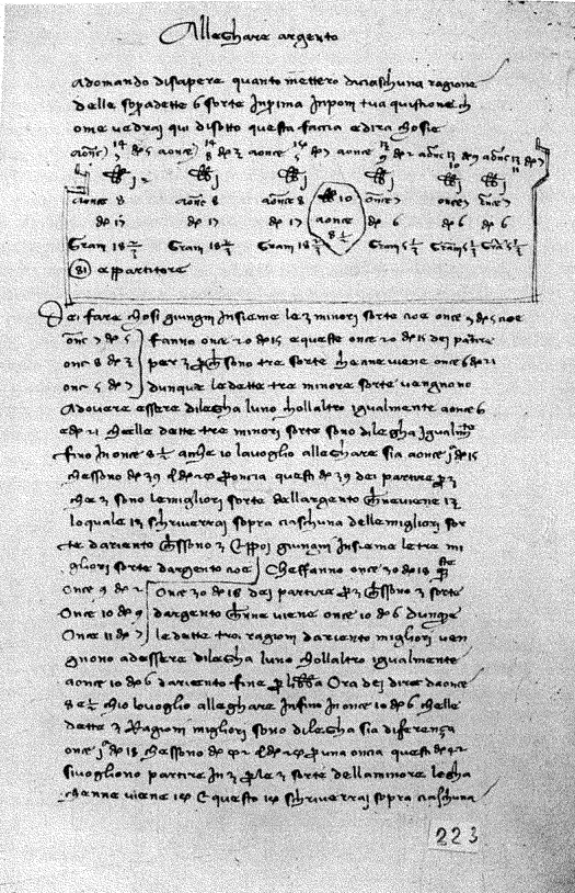 Francesco Balducci Pegolotti, Pratica della mercatura (1472 ms.) f. 223r